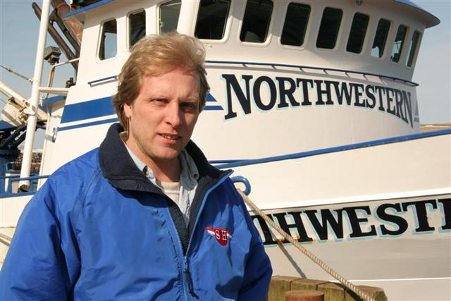 Sig Hansen IMO Number: 7719179 MMSI Number: 367604000 Callsign: WYE7339 Length: 41 m Beam: 10 m